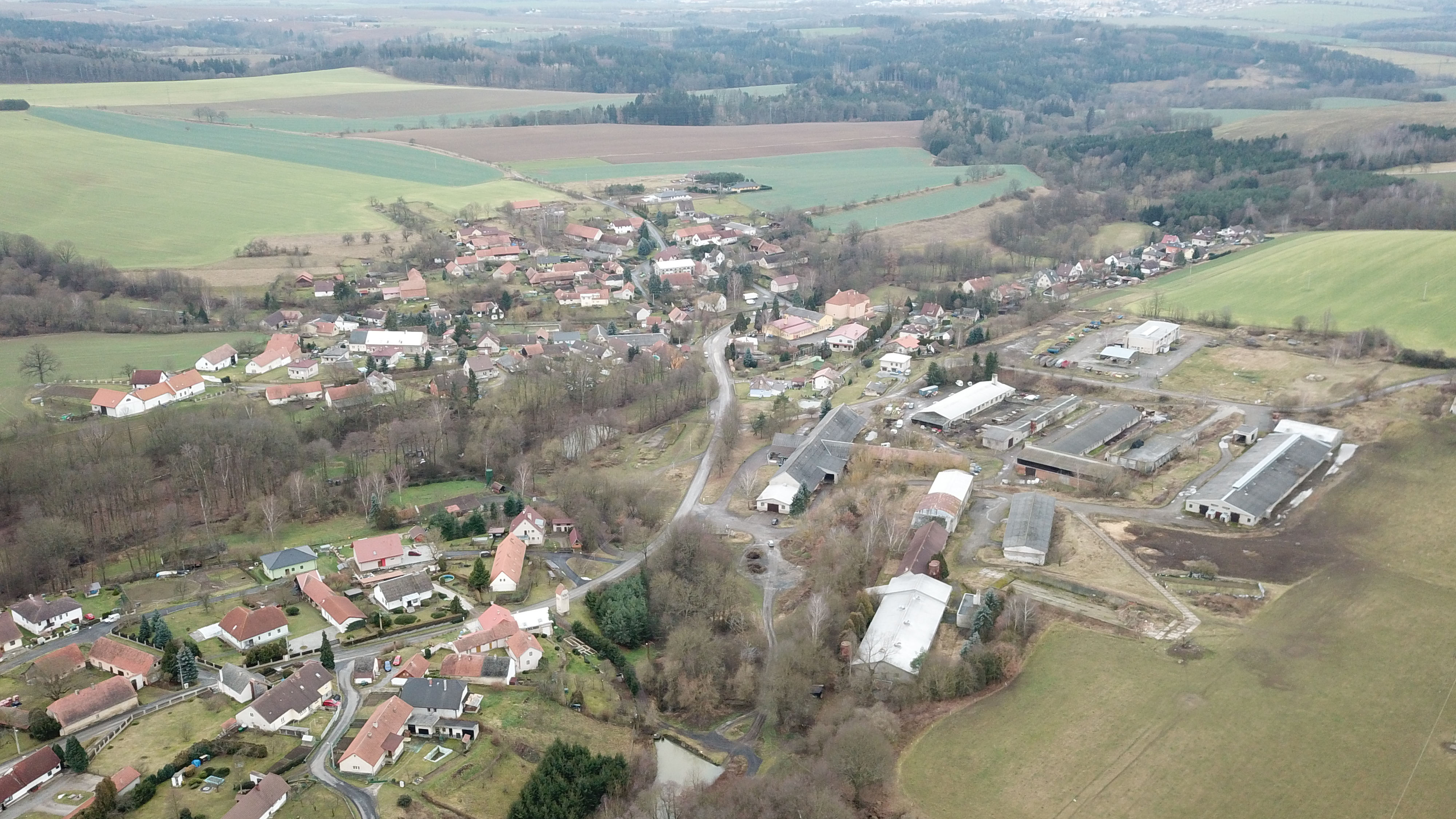 Letecká Petroupim od Petroupce